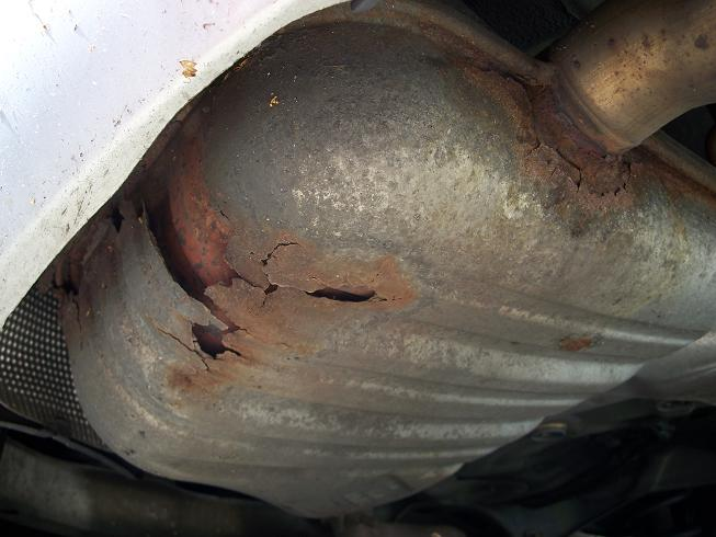 Durch Korrosion zerstörter Endschalldämpfer eines Opel Vectra C